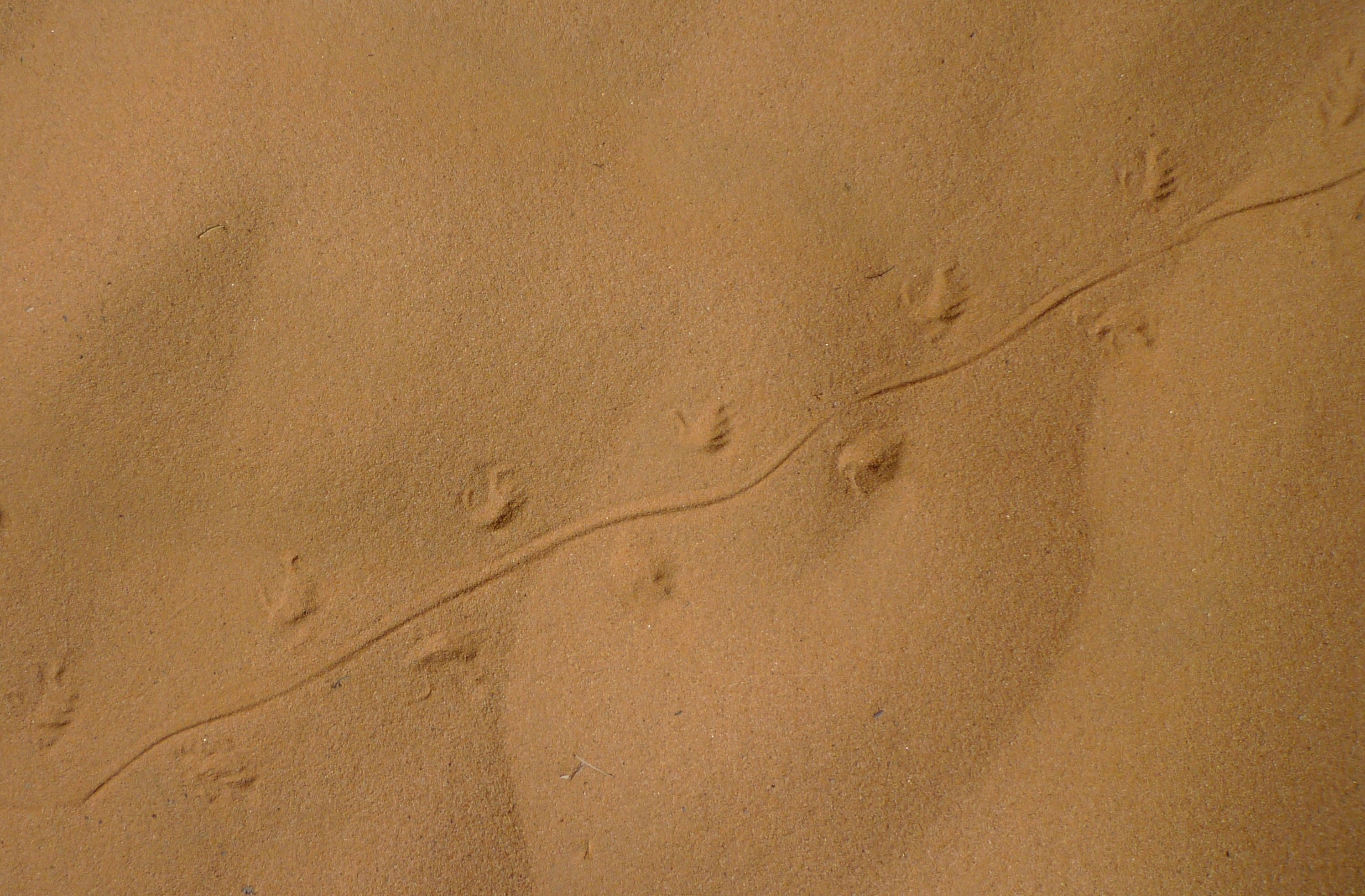 Akakus-Gebirge-Spur einer Wüsten-Springmaus im Sand